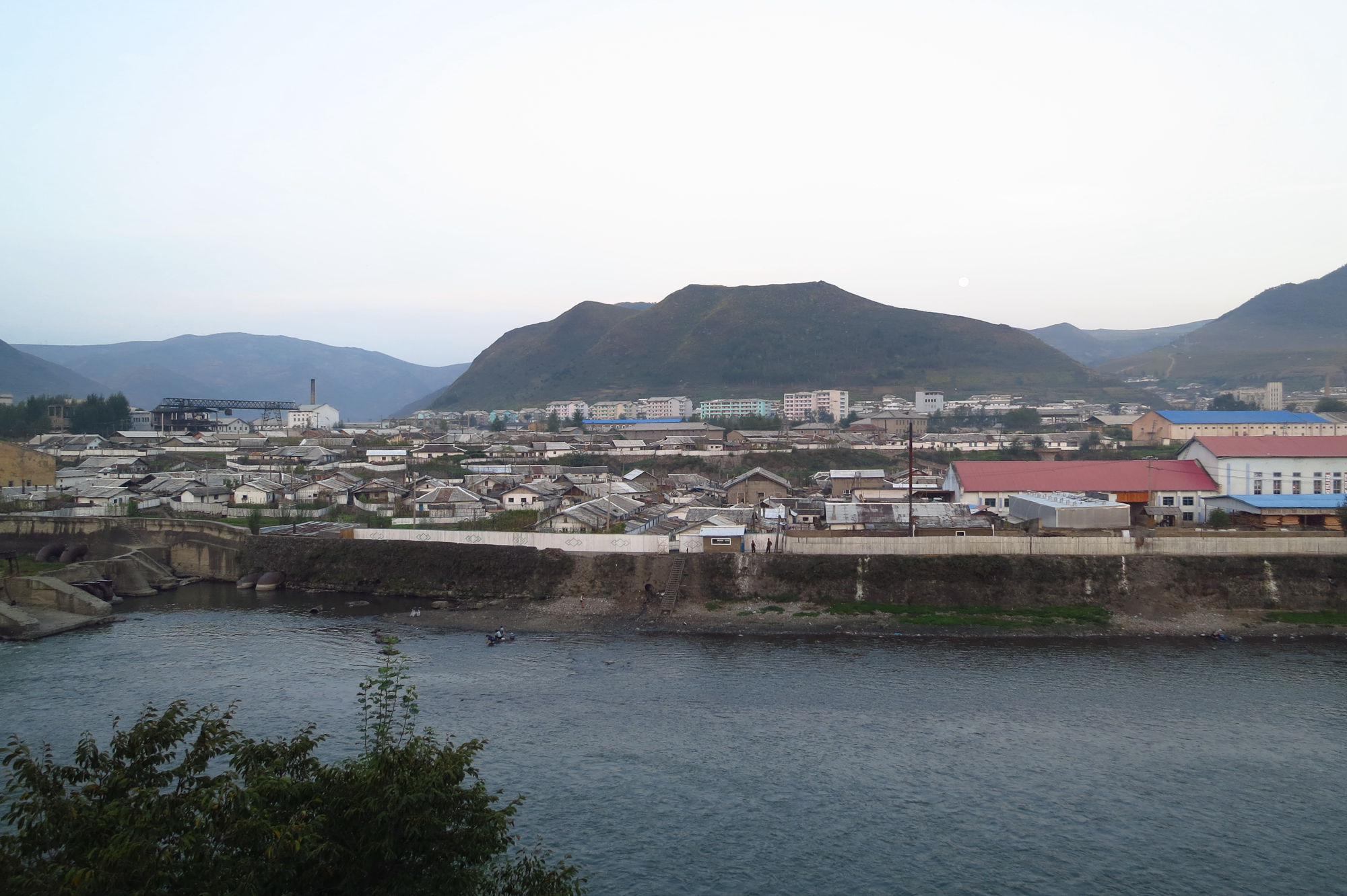 巡道工出品 photo by Xundaogong